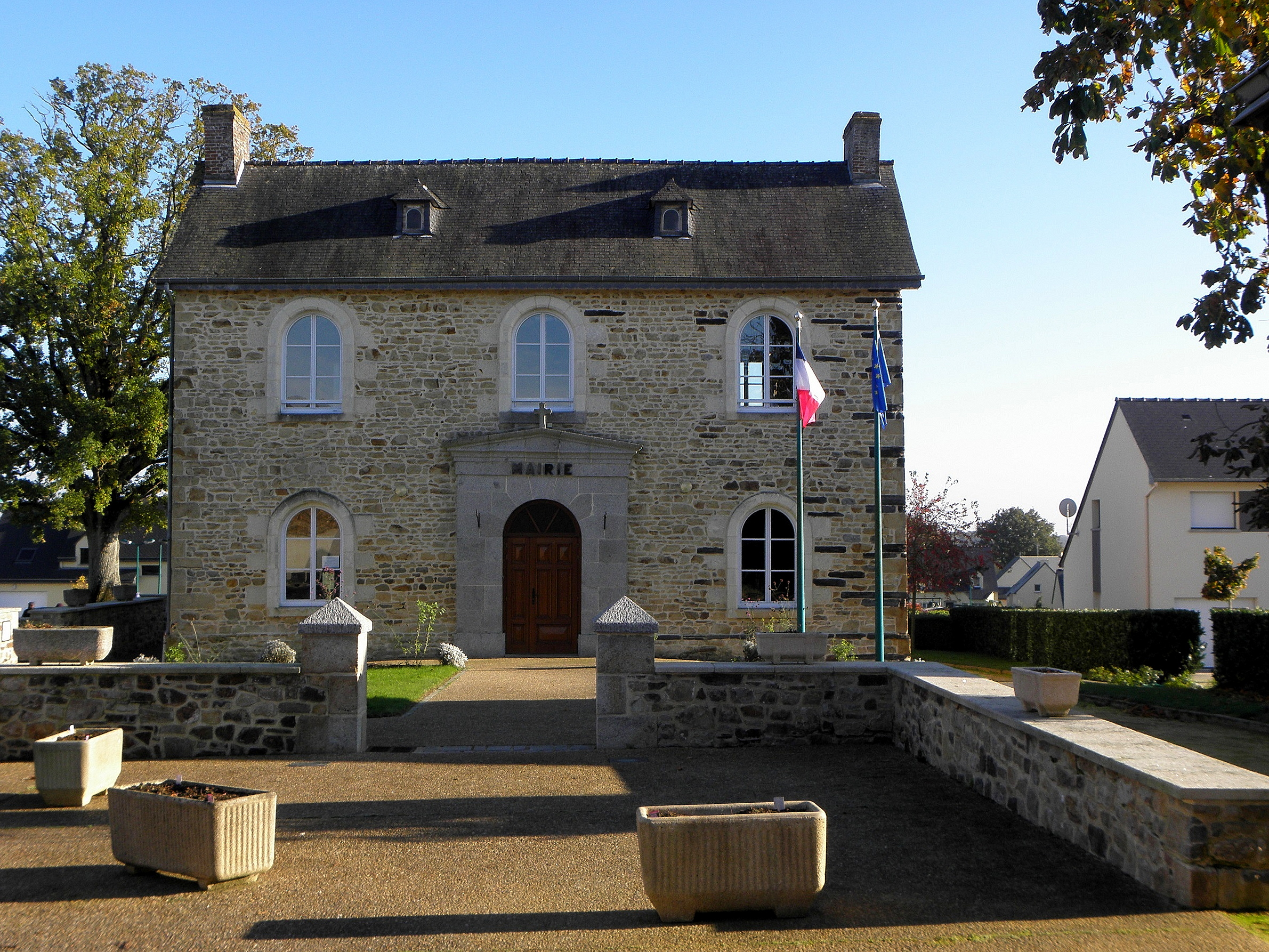 Mairie de Vergéal (35).